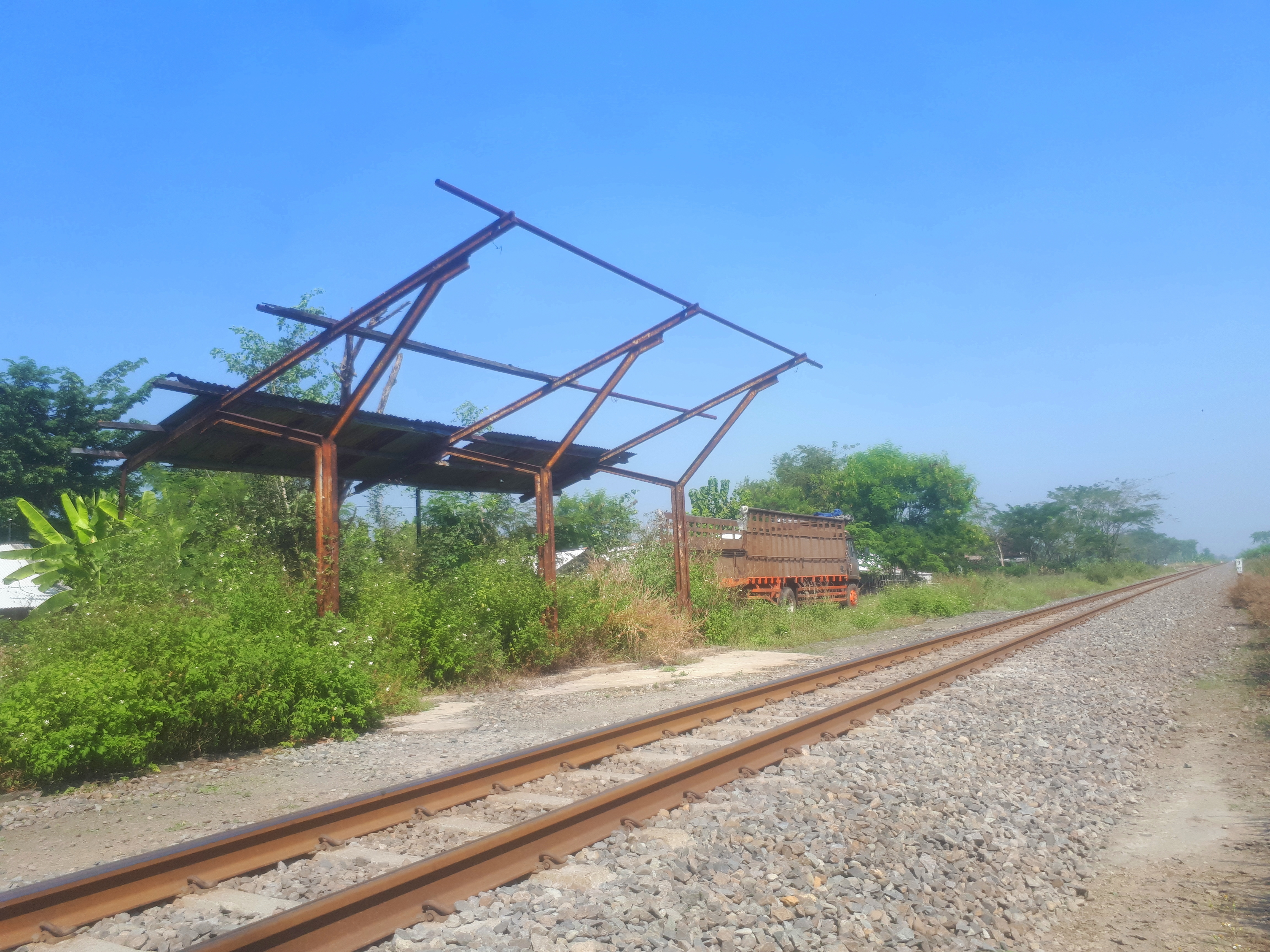 Tampak luar bangunan Halte Damarsi yang haanya meninggalkan kerangka bangunan serta ditumbuhi tumbuhan liar, 2020